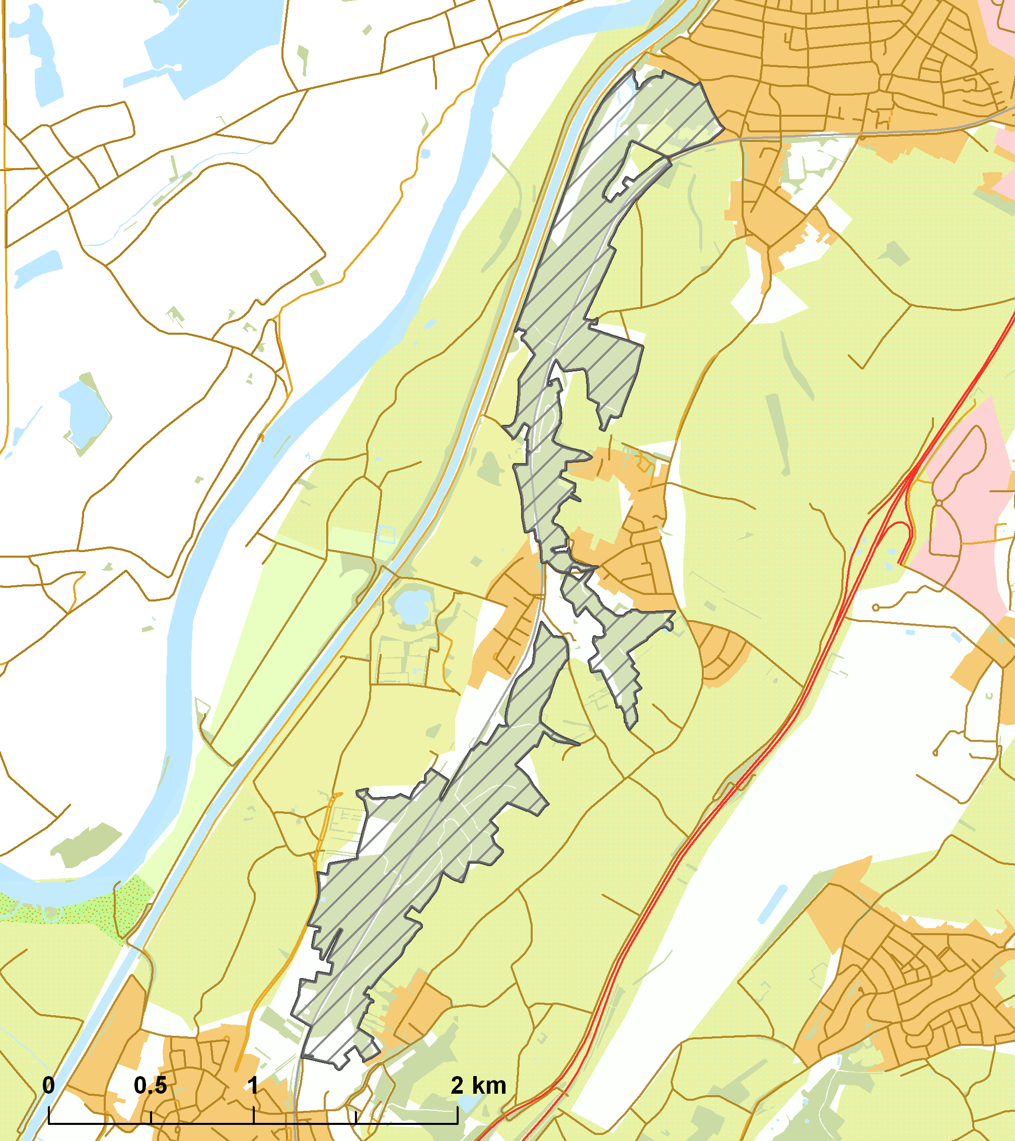 Natura2000 - Bunder- en Elsloërbos.png